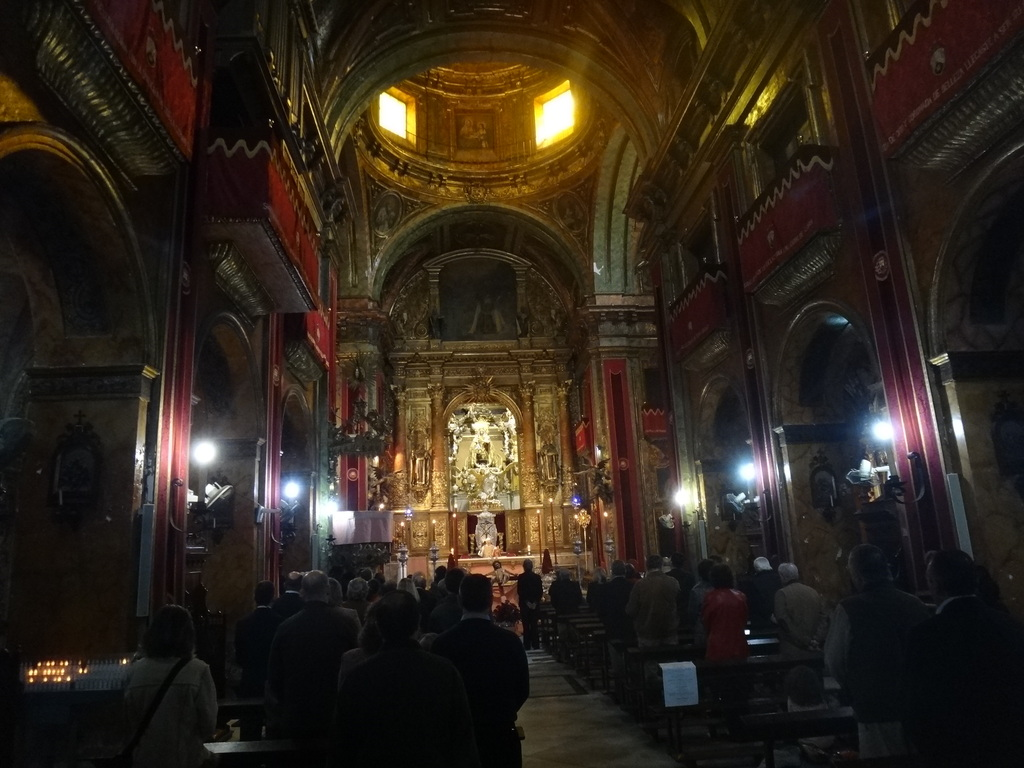 Basilica de Nuestra Señora del Carmen Coronada, Jerez de la Frontera (Andalucía, España)